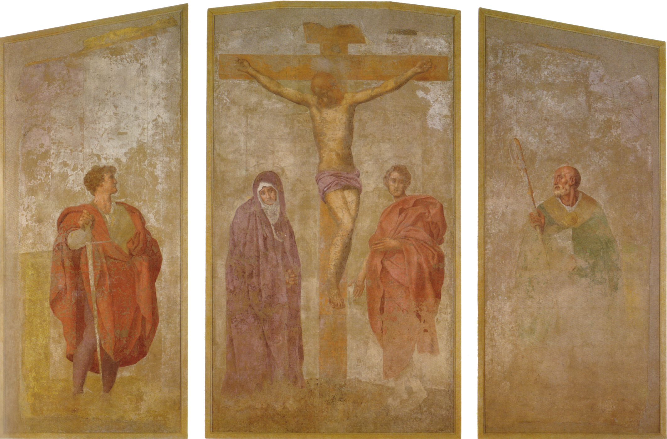 Pontormo, tabernacolo di boldrone, 1521-22 ca